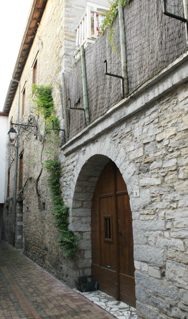 Façade de l'ancien Hôtel de la Monnaie, depuis la rue de La Monnaie.